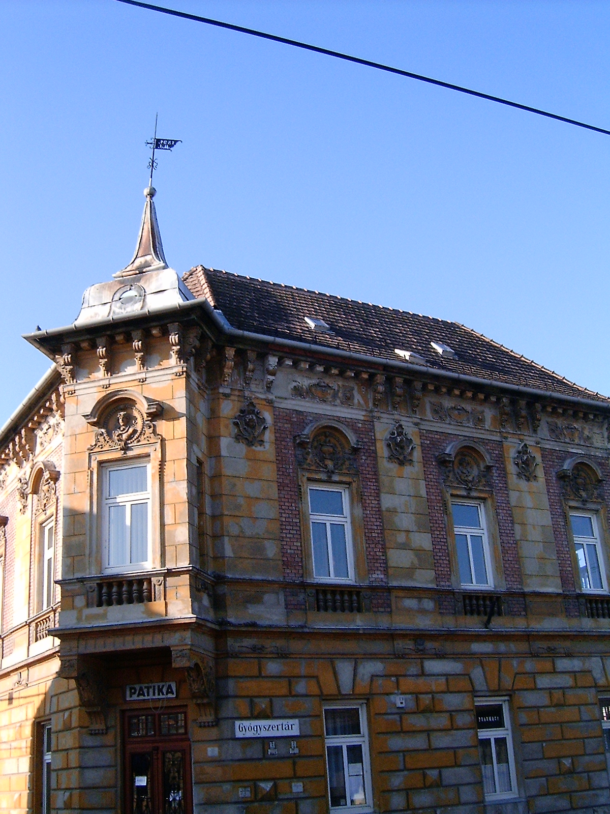 Az Aranysas Gyógyszertár Győr-Szigetben (Győr-Moson-Sopron megye)